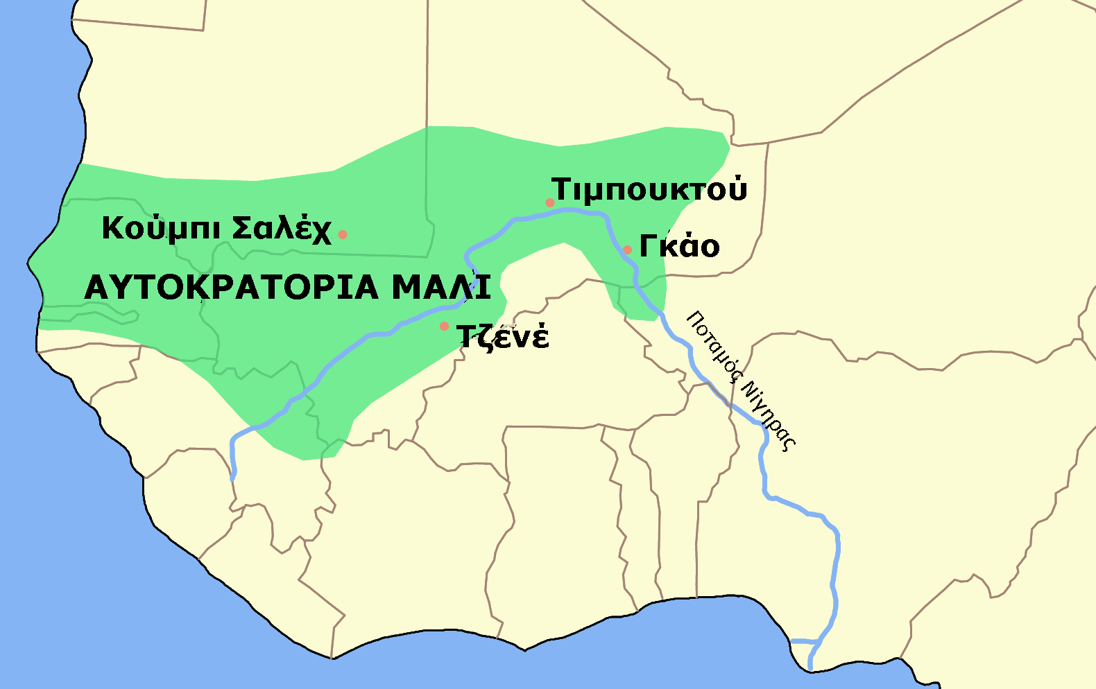 Χάρτης της Αυτοκρατορίας Μάλι